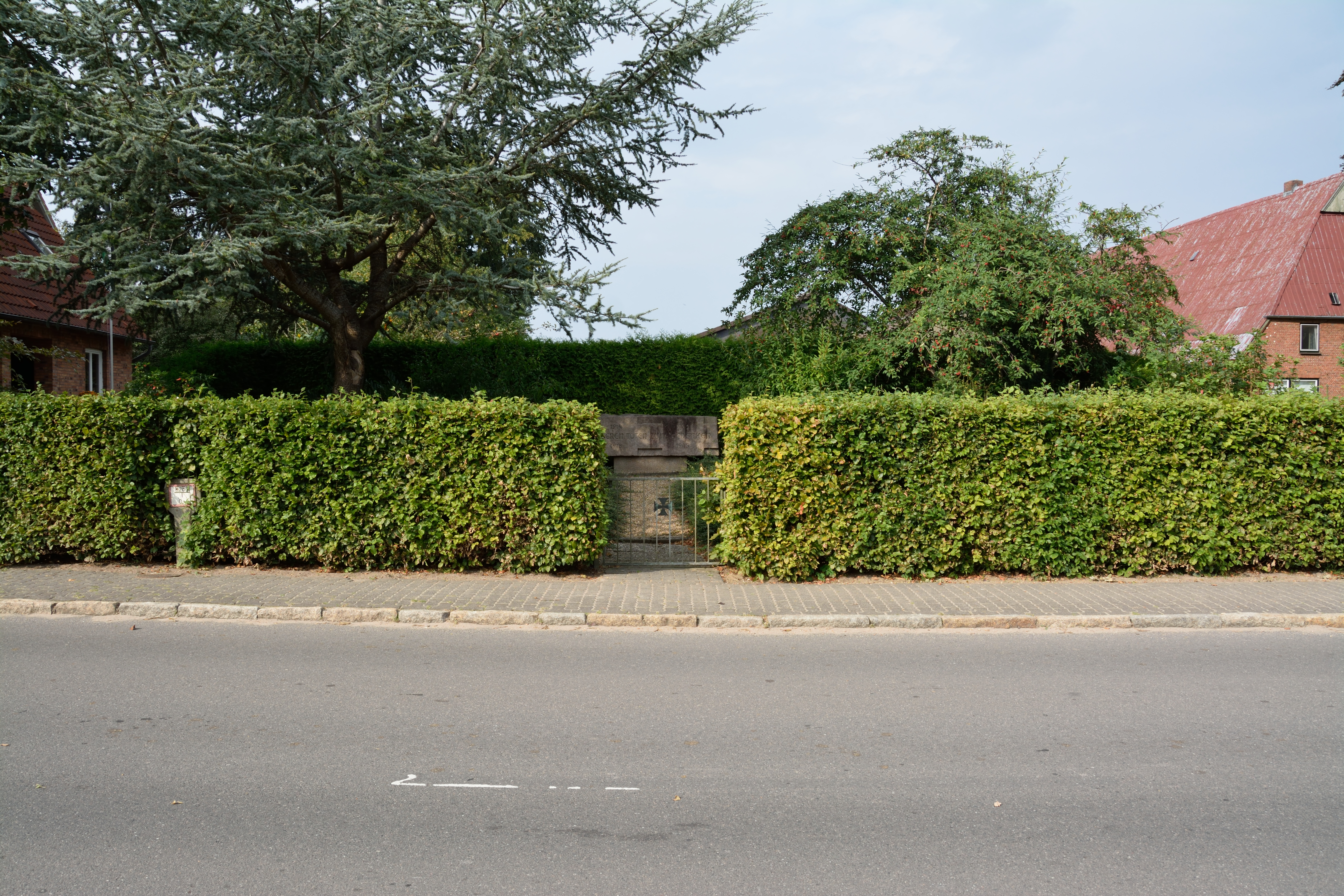 Ehrenmal in Rade